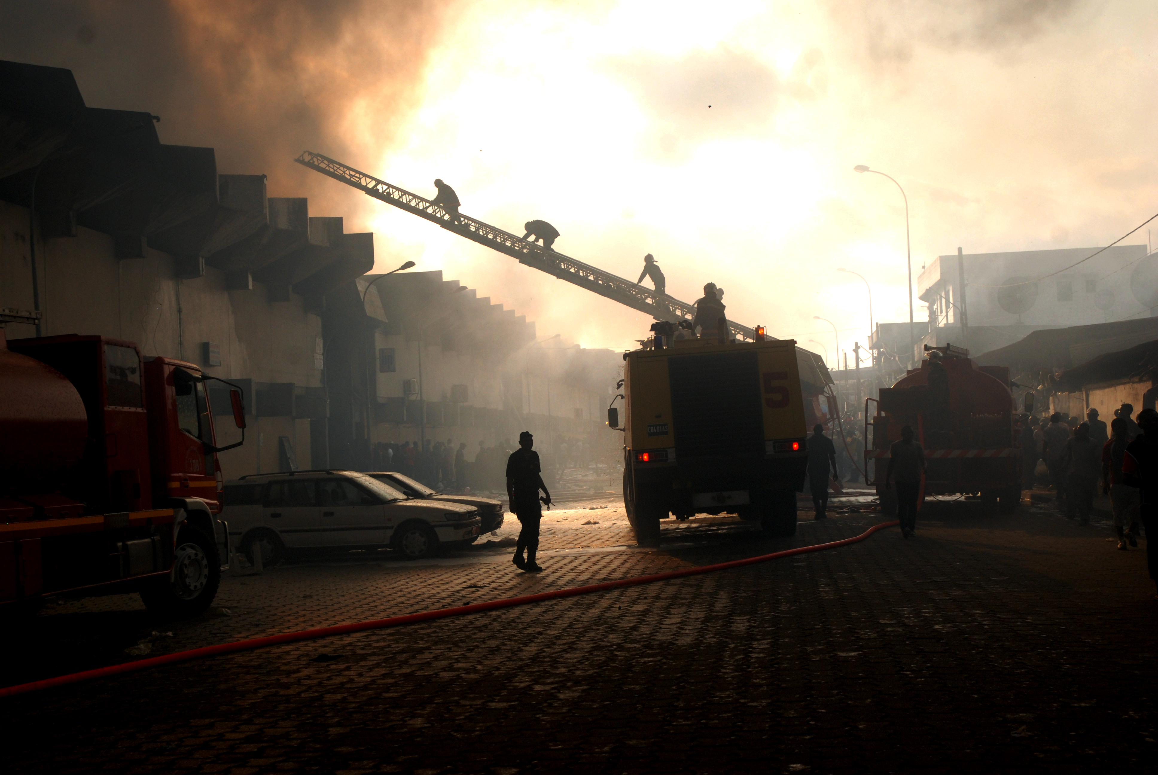 intervention du corps des sapeurs pompiers pendant un incendie au marché central de Douala au Cameroun. This is an image with the theme "Africa on the Move or Transport" from: Cameroon